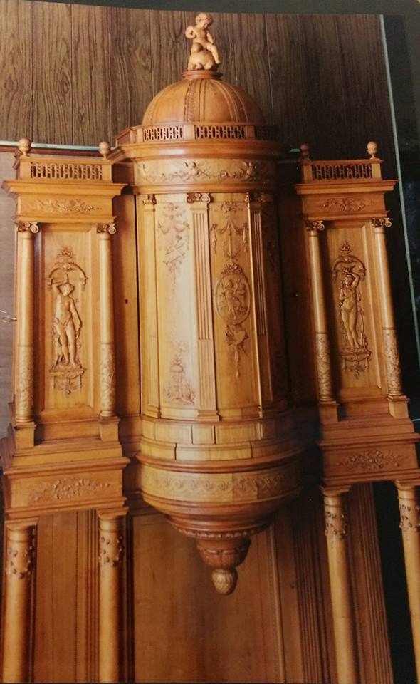 Œuvre en noyer